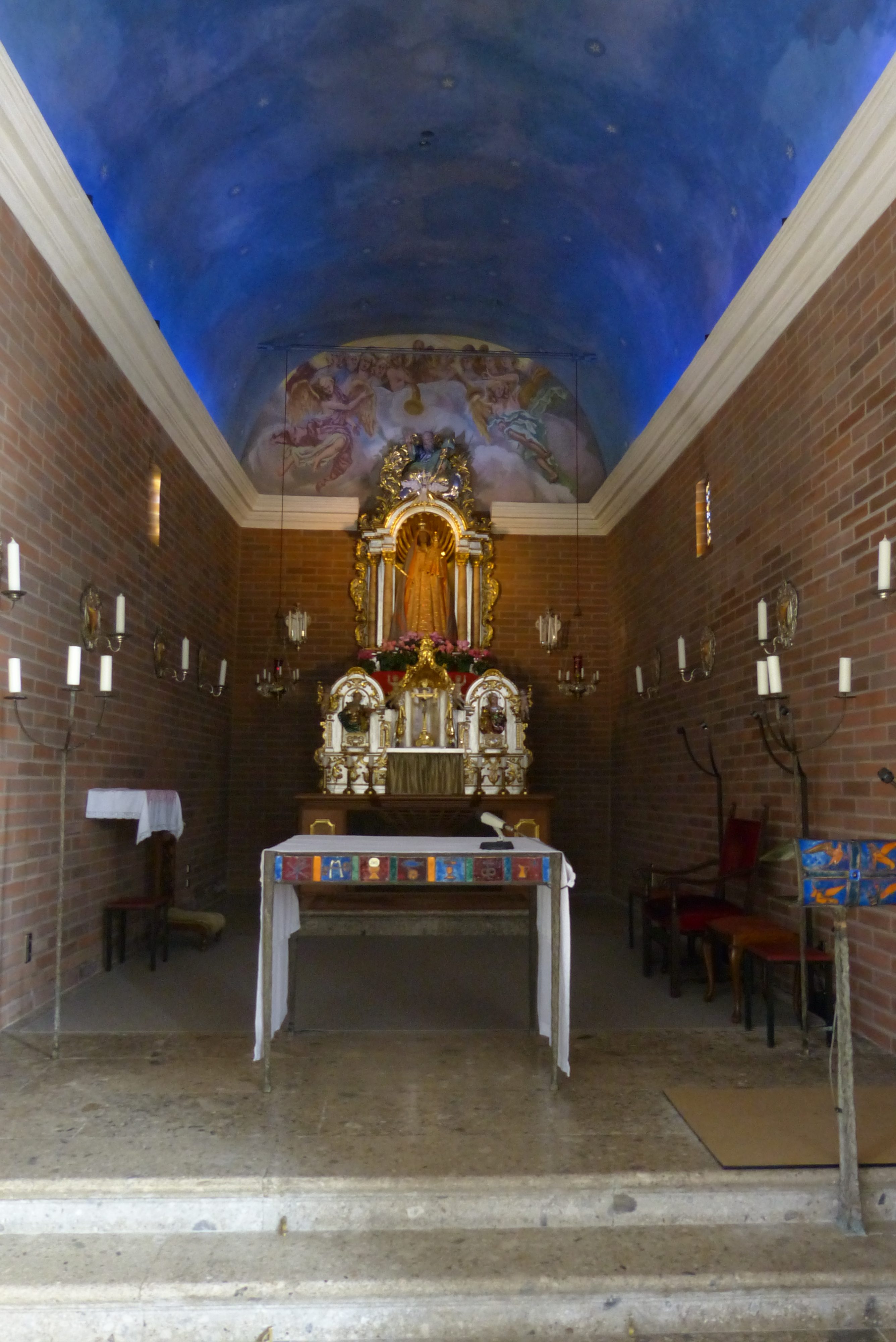 Gnadenkapelle in der Wallfahrtskirche St. Maria von Loreto auf dem Kobel in Westheim (Neusäß)